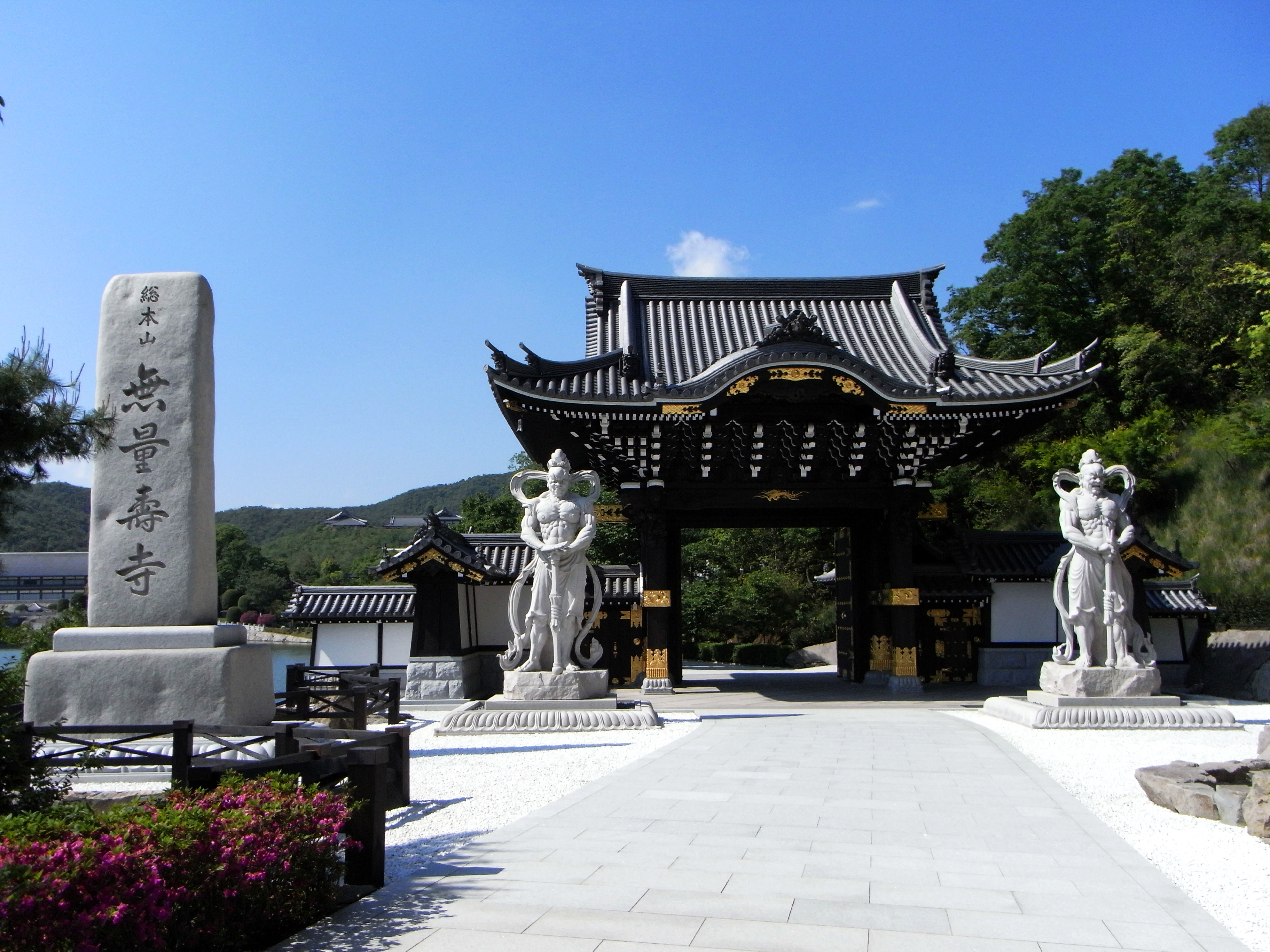 念仏宗(念佛宗)無量寿寺「佛教之王堂」南門